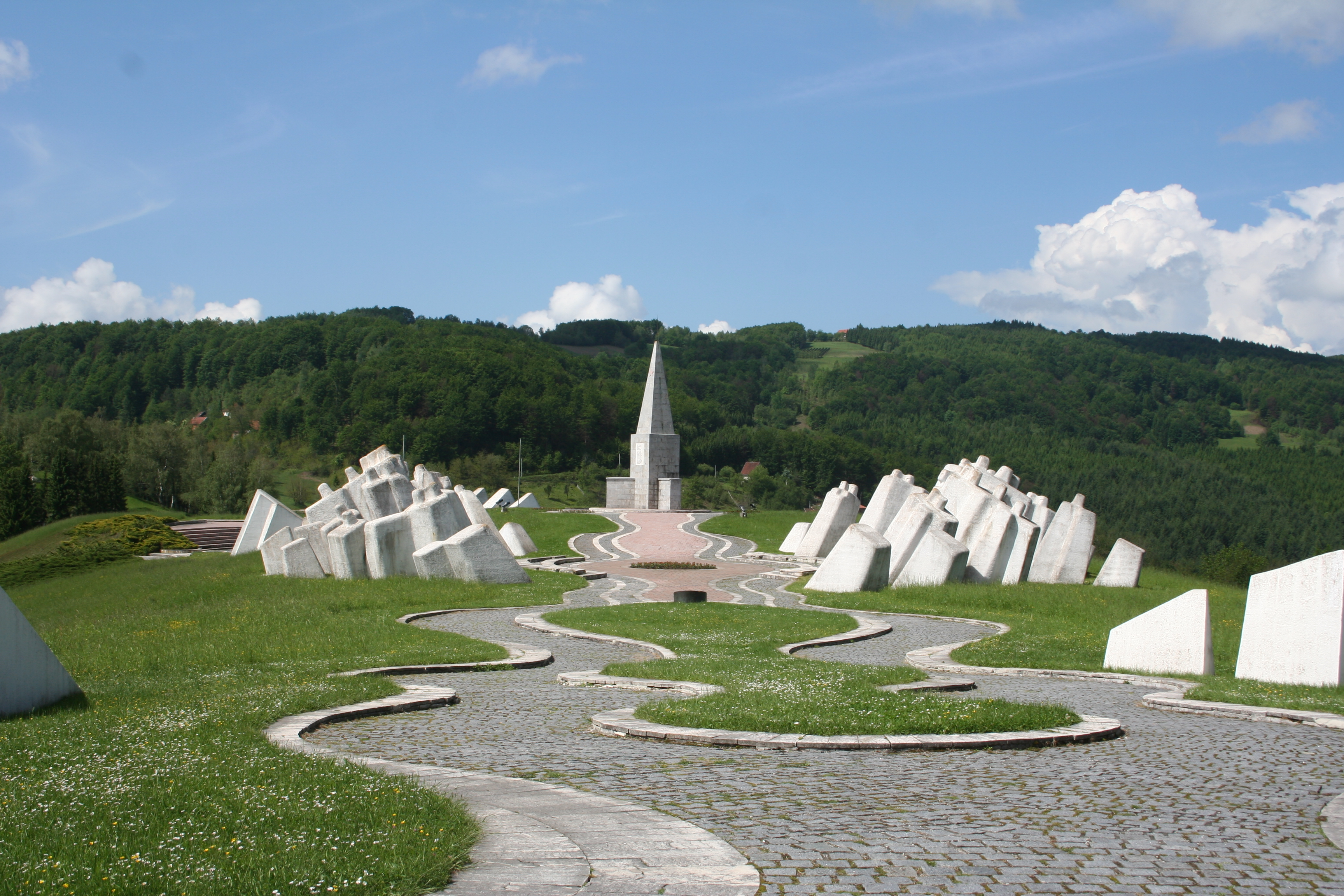 Ово је фотографија заштићеног природног добра у Србији под шифром: МПС25This is a a photo of a natural area in Serbia with ID: МПС25 Spomen kompleks Kadinjača